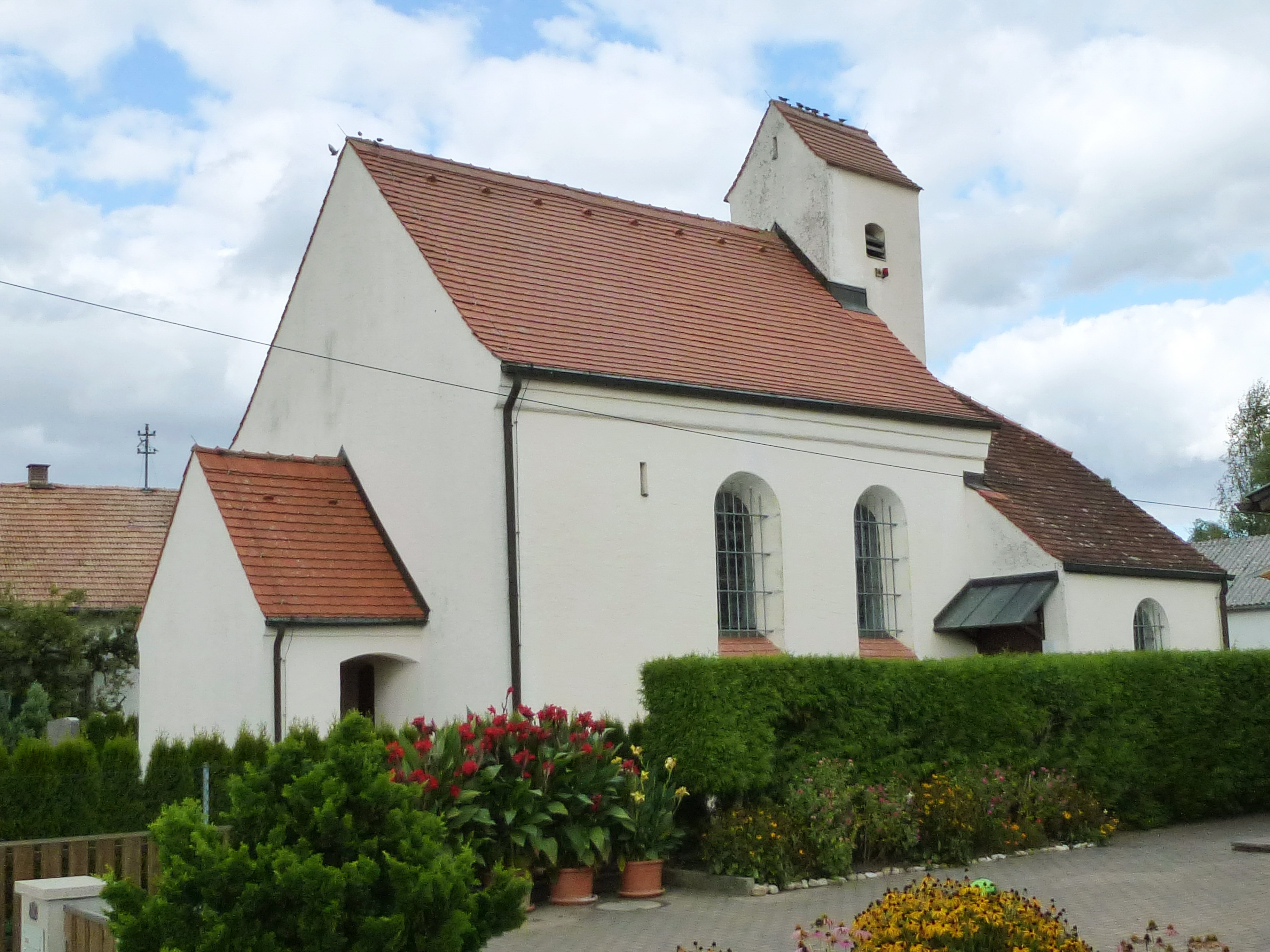 Arzbach, Römerstr.9: Katholische Filialkirche St. Johannes und Paulus. In der Konradinischen Matrikel von 1315 wird die Kirche mit der Bezeichnung "Ertzbach" als Filiale von Pellheim erwähnt. Auch heute noch ist sie der Pfarrei Pellheim zugeordnet. Ansicht von SW